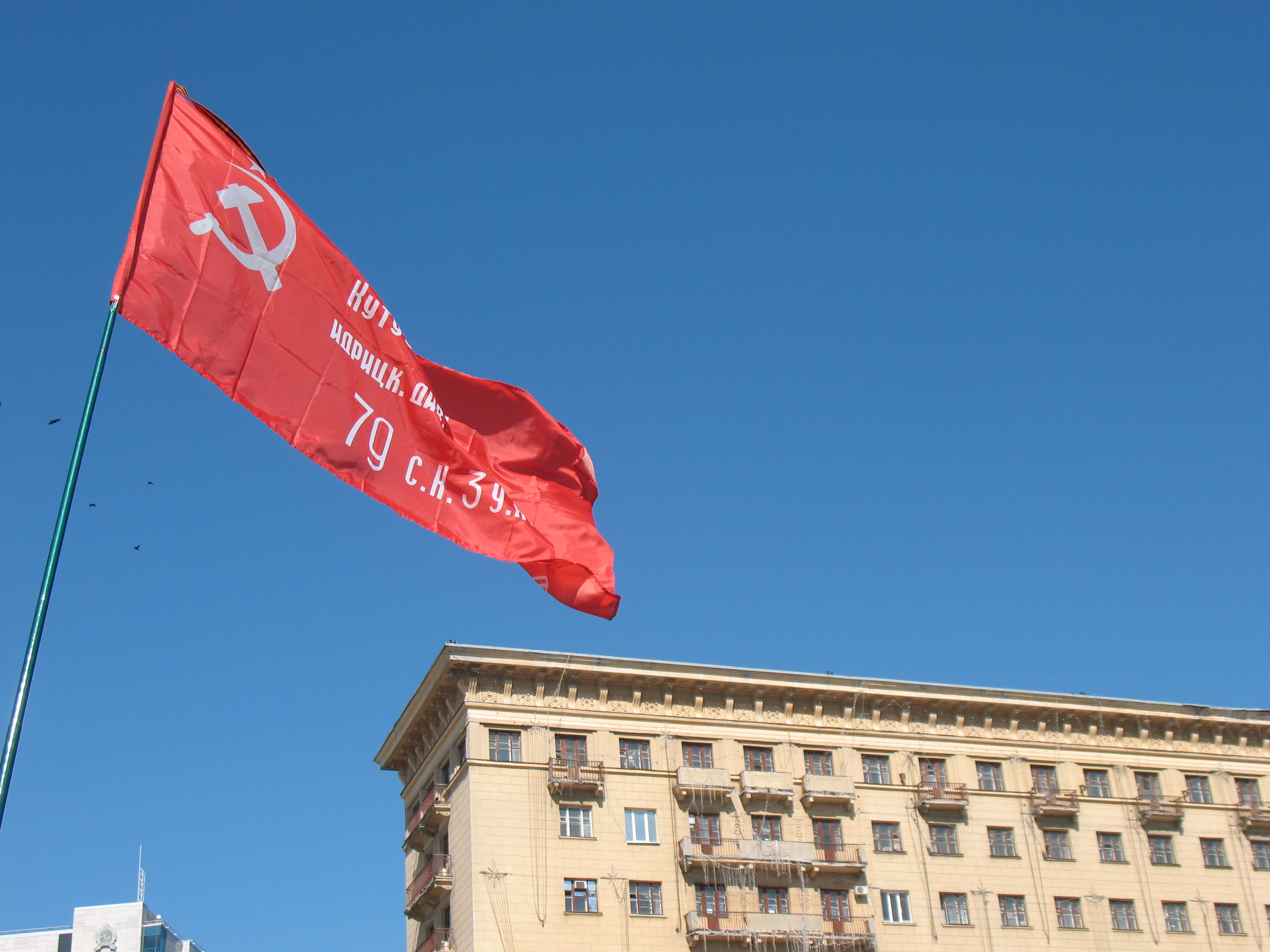 Знамя Победы над центральной площадью Харькова. Харьков, антинационалистический митинг.